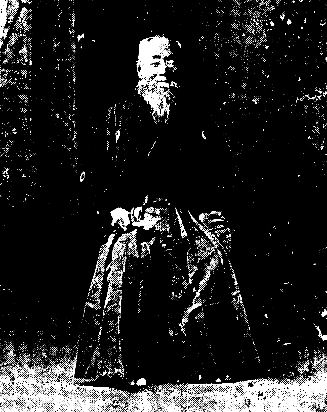 晩年の鳴門義民（佐々文三郎氏提供）